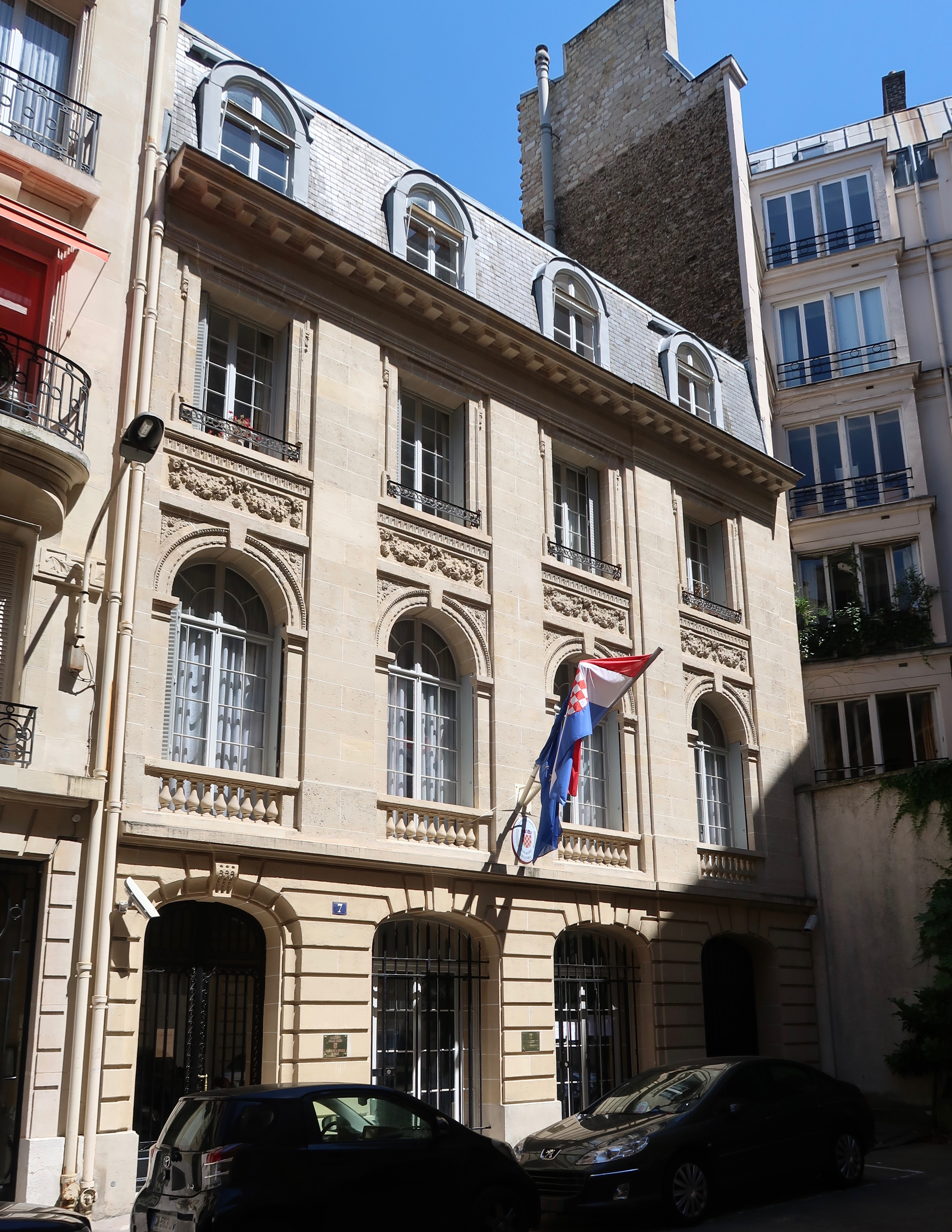 Ambassade de Croatie en France, 7 square Thiers (Paris, 16e).